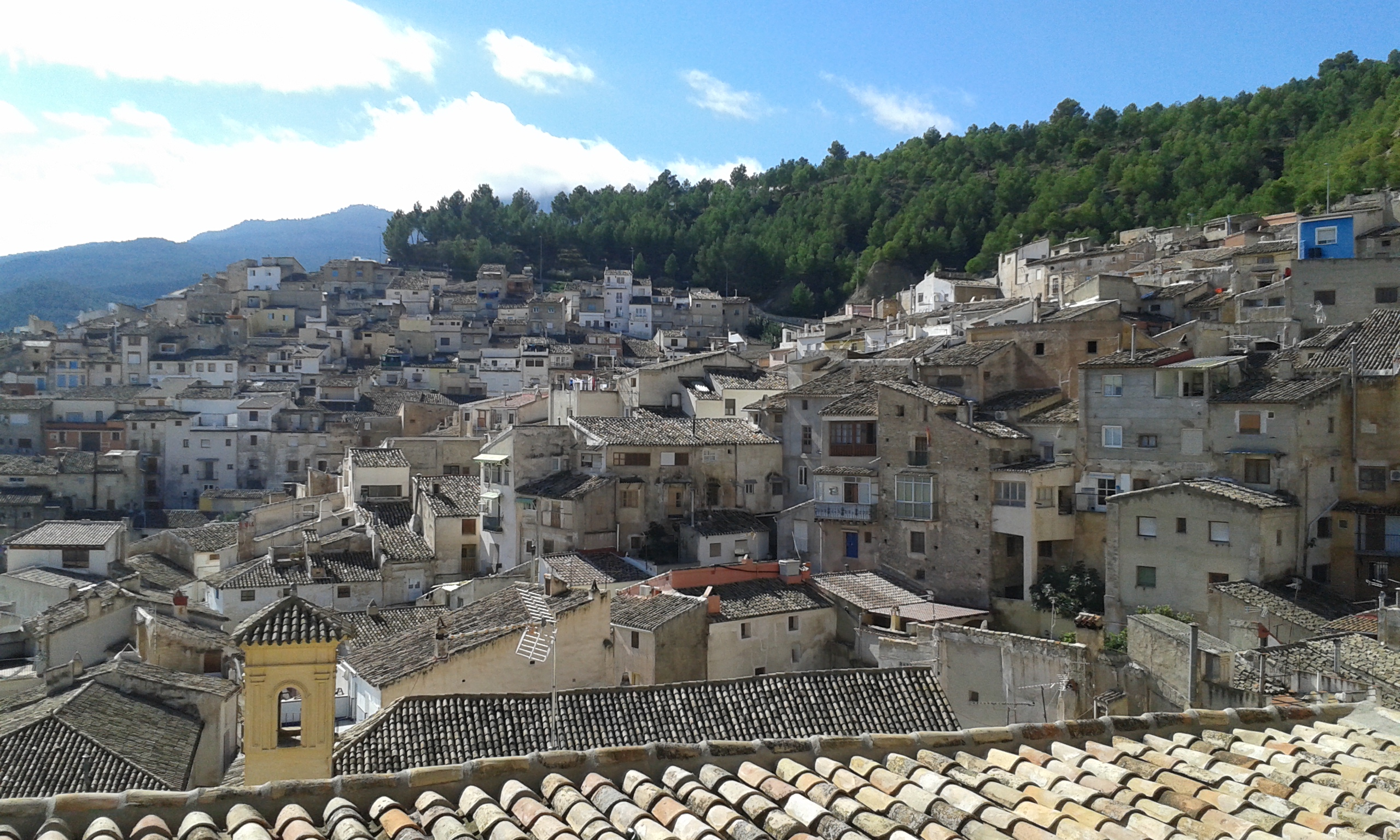 Casco urbano de Moratalla